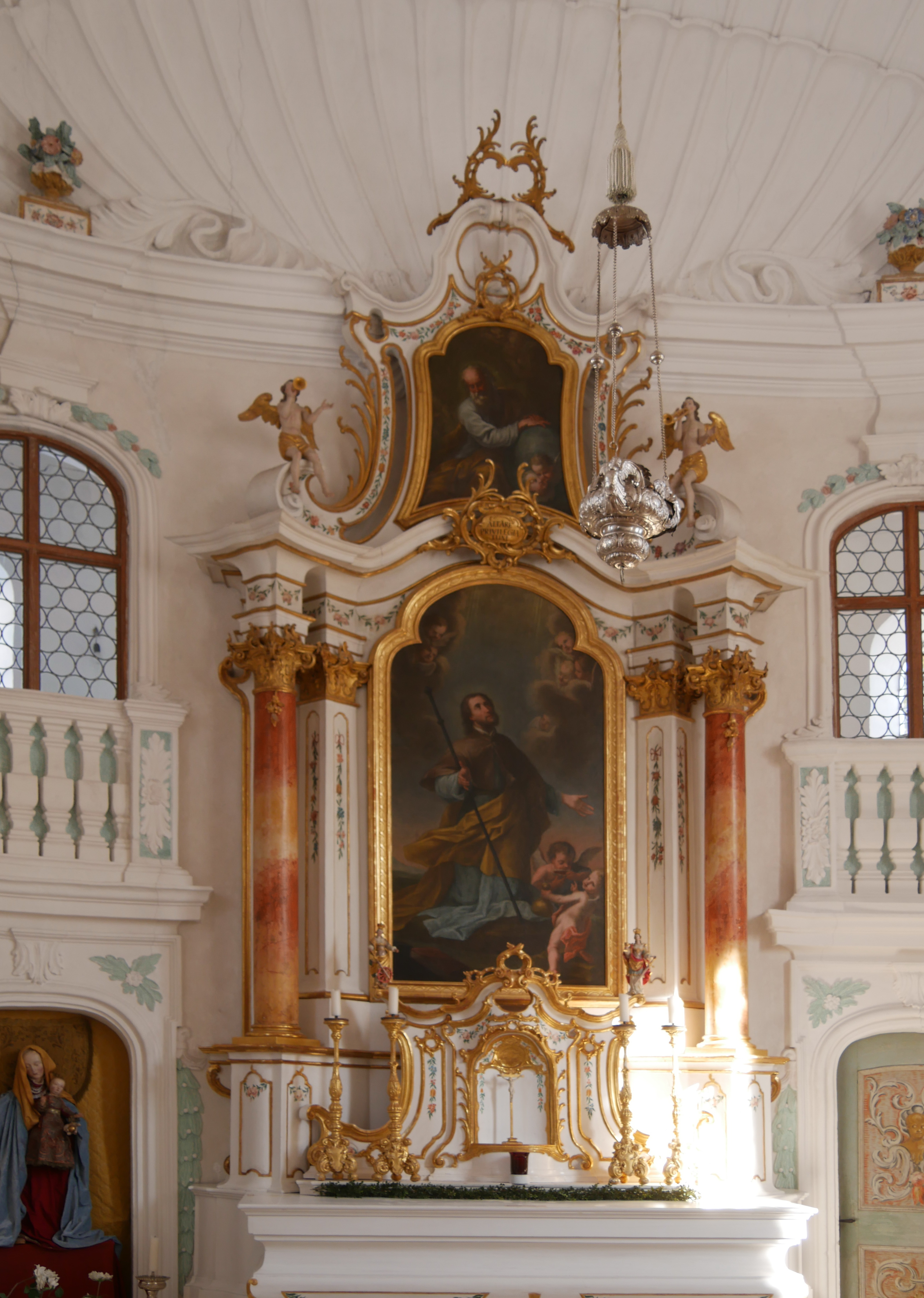 Kochel am See, Ortsteil Walchensee, Seestr. 58: Alte katholische Pfarrkirche Sankt Jakobus. Innenansicht zum Hauptaltar. Das Altarbild zeigt den Namenspatron St. Jakobus den Älteren